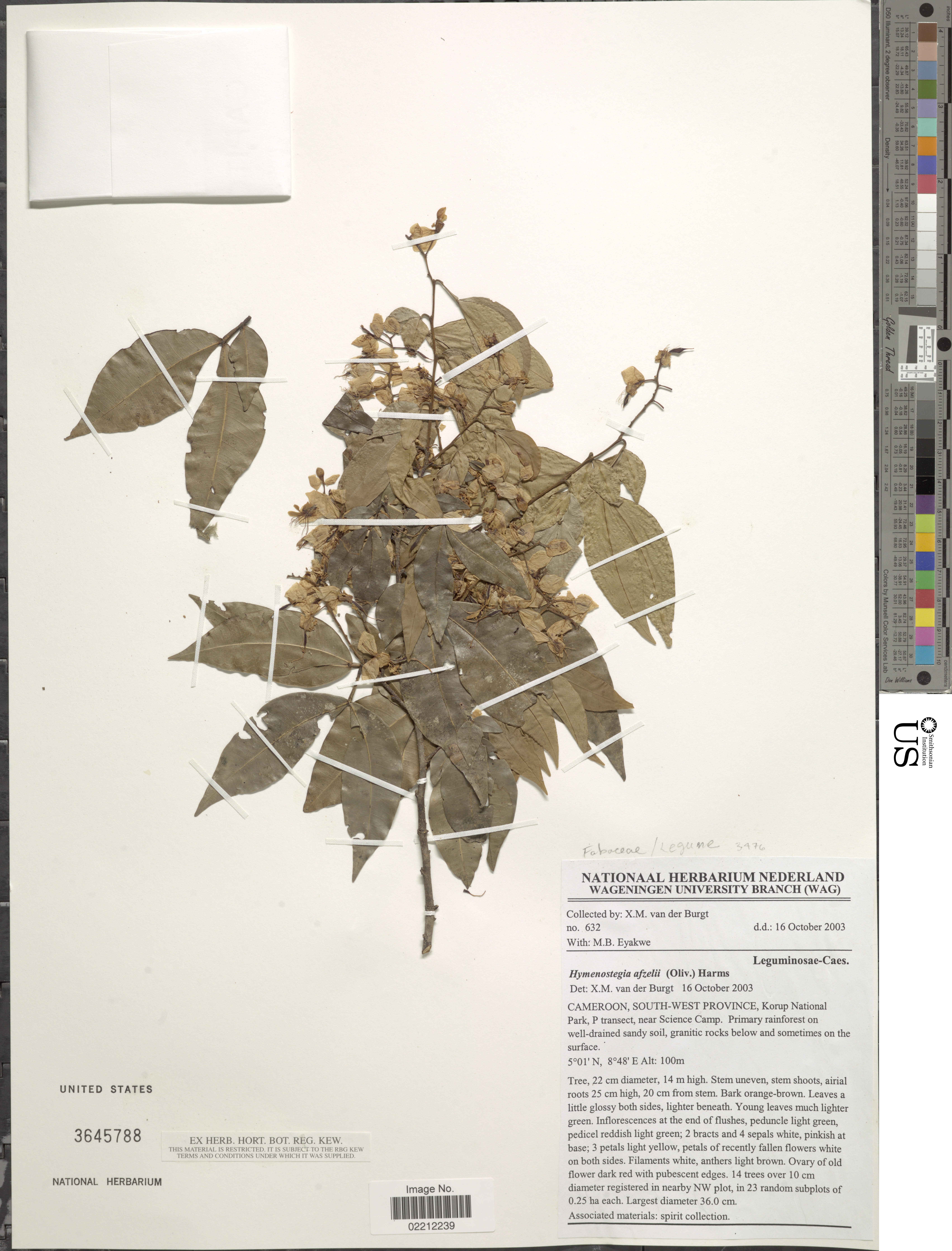 Hymenostegia afzelii (Oliv.) Harms Object Details Biogeographical Region 23 - West-Central Tropical Africa Collector Xander M. van der Burgt Min. Elevation 100 Record Last Modified 4 Aug 2017 Specimen Count 1 Collection Date 16 Oct 2003 Barcode 02212239 USNM Number 3645788 Place Cameroon, South-west province, Korup National Park, P transect, near Science Camp., Cameroon, Africa Published Name Hymenostegia afzelii (Oliv.) Harms Taxonomy Plantae Dicotyledonae Rosales Fabaceae Caesalpinioideae NMNH - Botany Dept. Record ID nmnhbotany_13164144 Usage of Metadata (Object Detail Text) CC0 GUID (Link to Original Record)